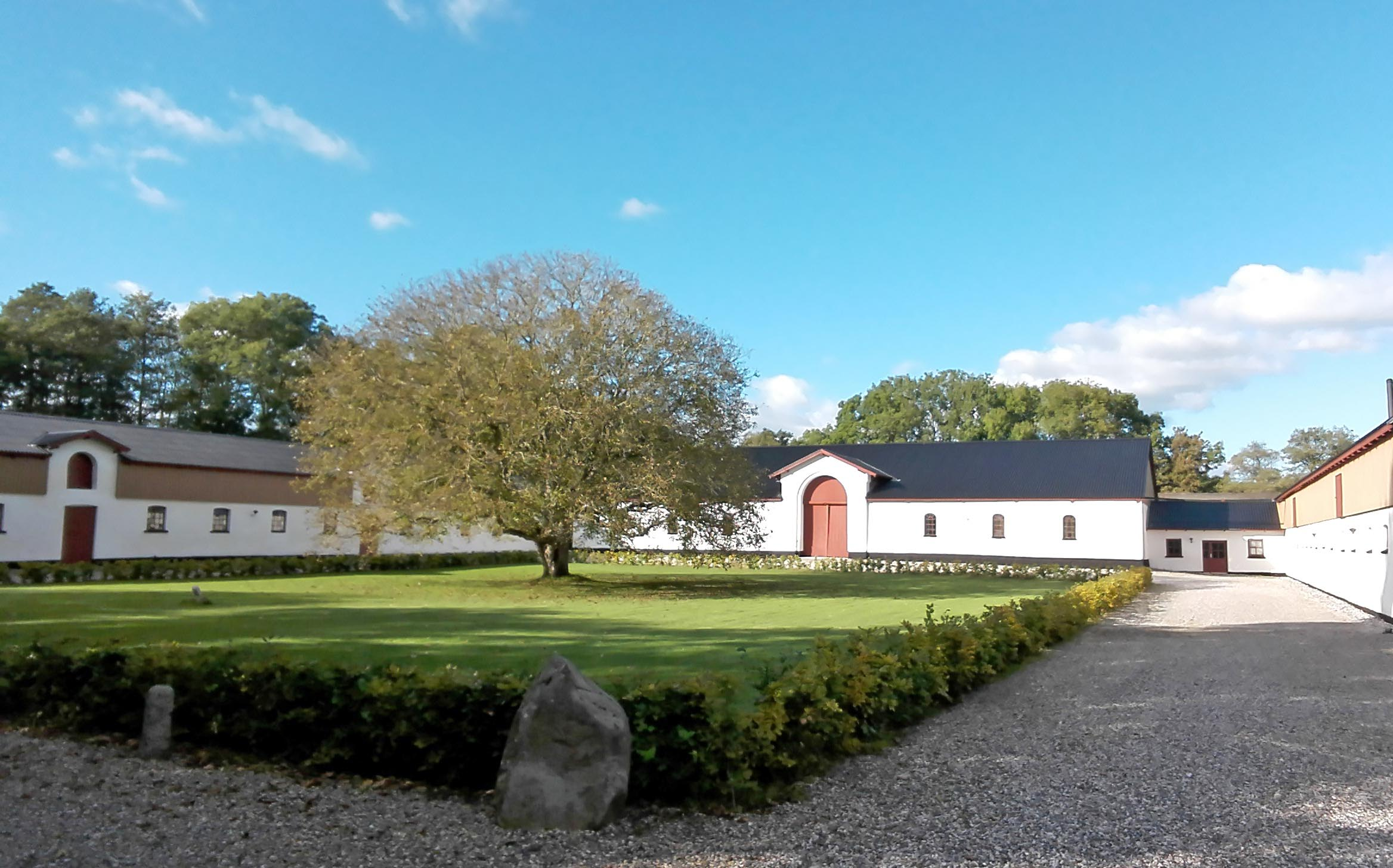 Skærsø Herregårds avlsbygninger